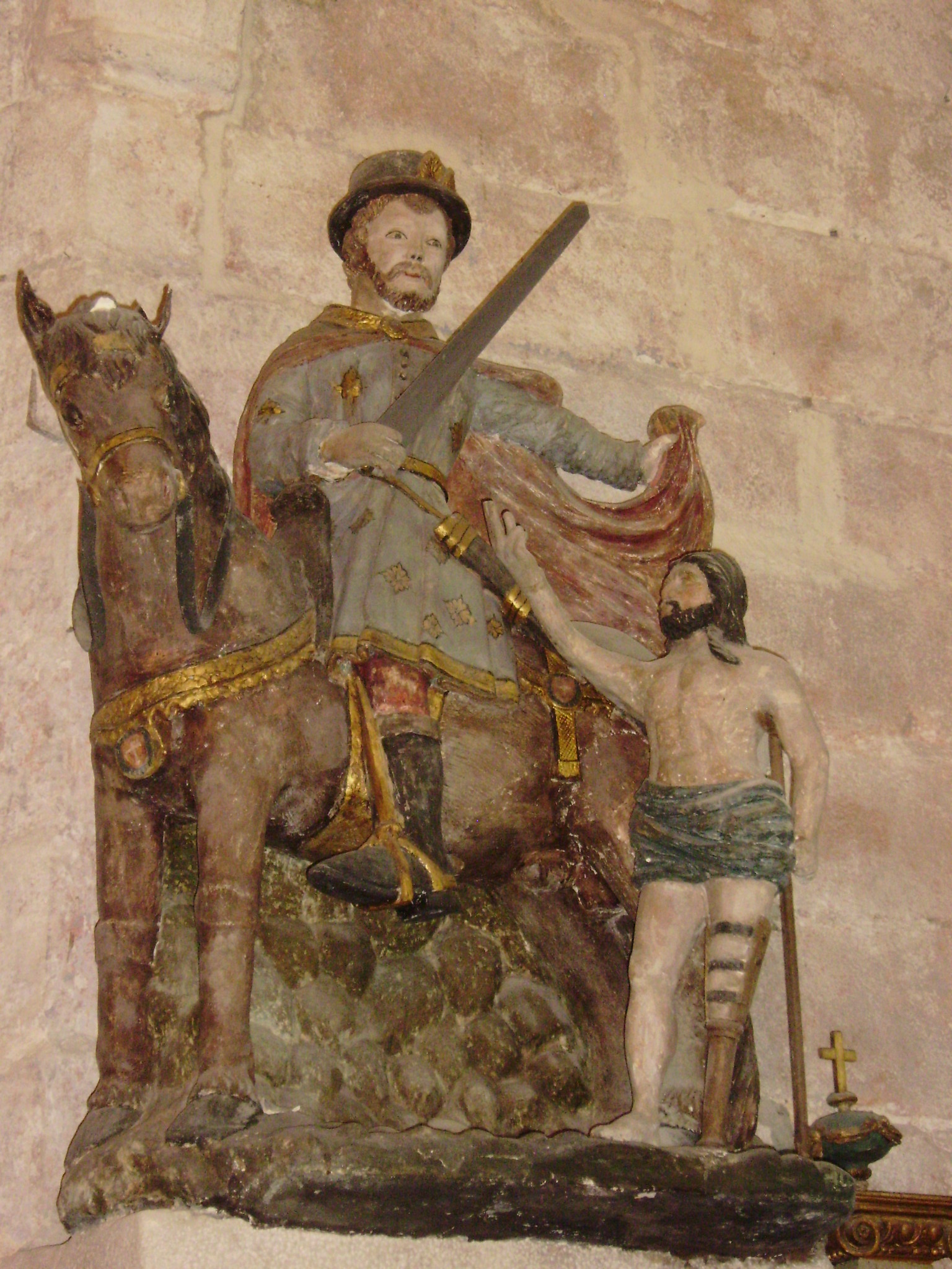 Statue des hl. Martin in der Kirche Veules-les-Roses